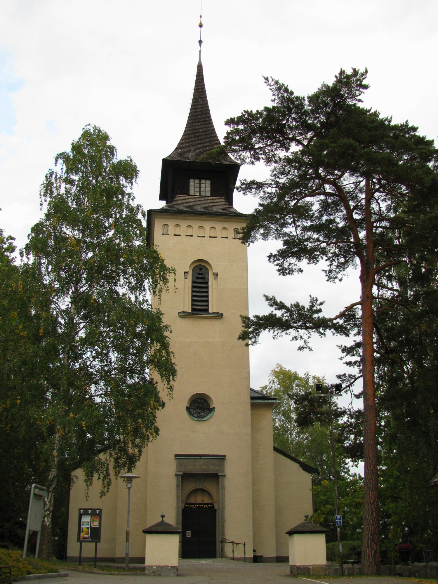 Boo kyrka i Nacka kommun. Källa: eget foto, fotograf EnDumEn 27 september 2008.